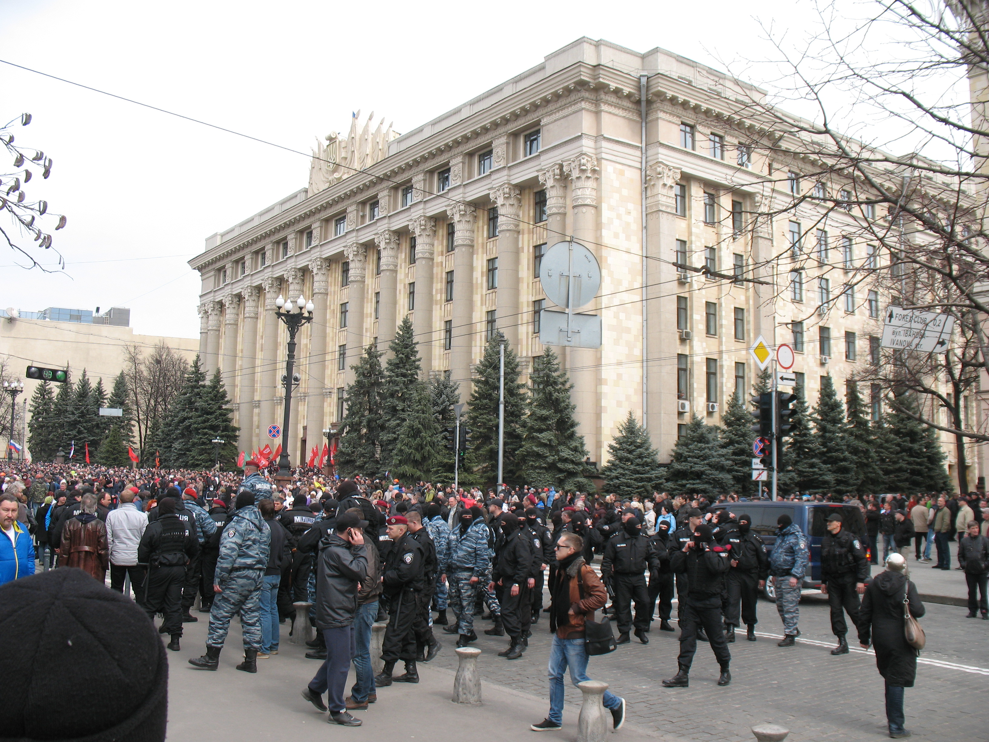 Протесты в Харькове